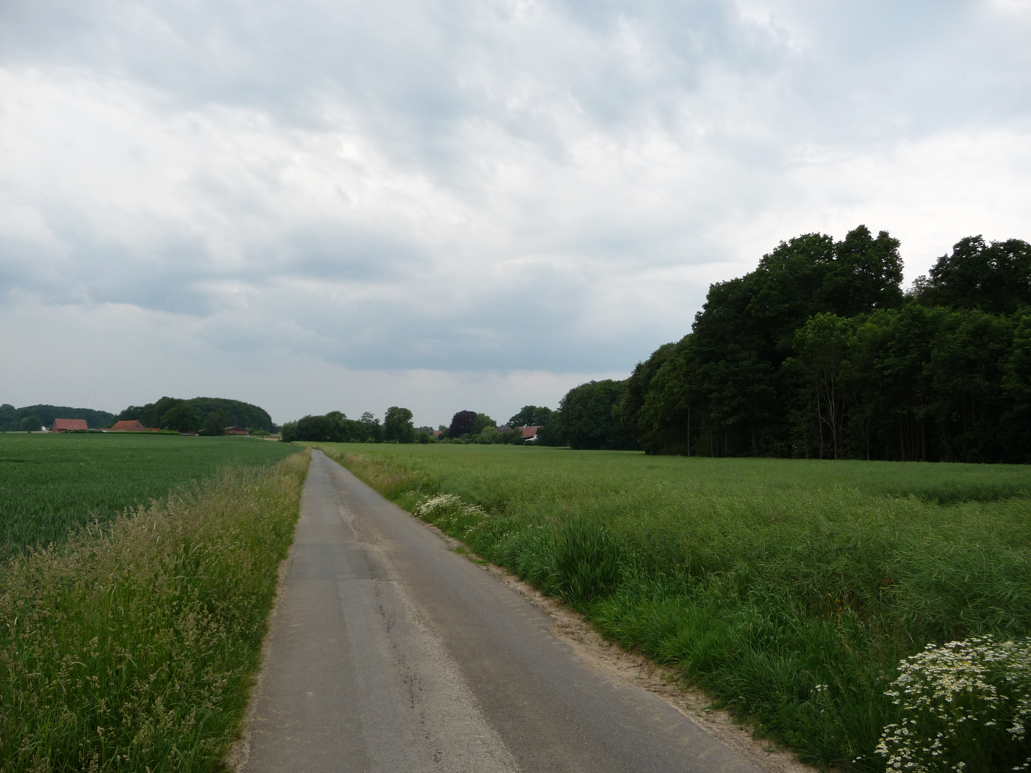 Ein kleines Waldstück auf dem Land in der Nähe von Eickholt. Sehenswert hier sind große Baumwurzeln von entwurzelten Bäumen, die eine Art Höhle gebildet haben.